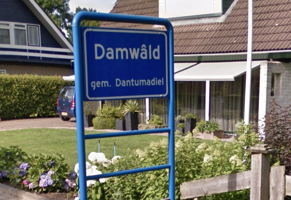 Plaknammeboerd fan Damwâld.